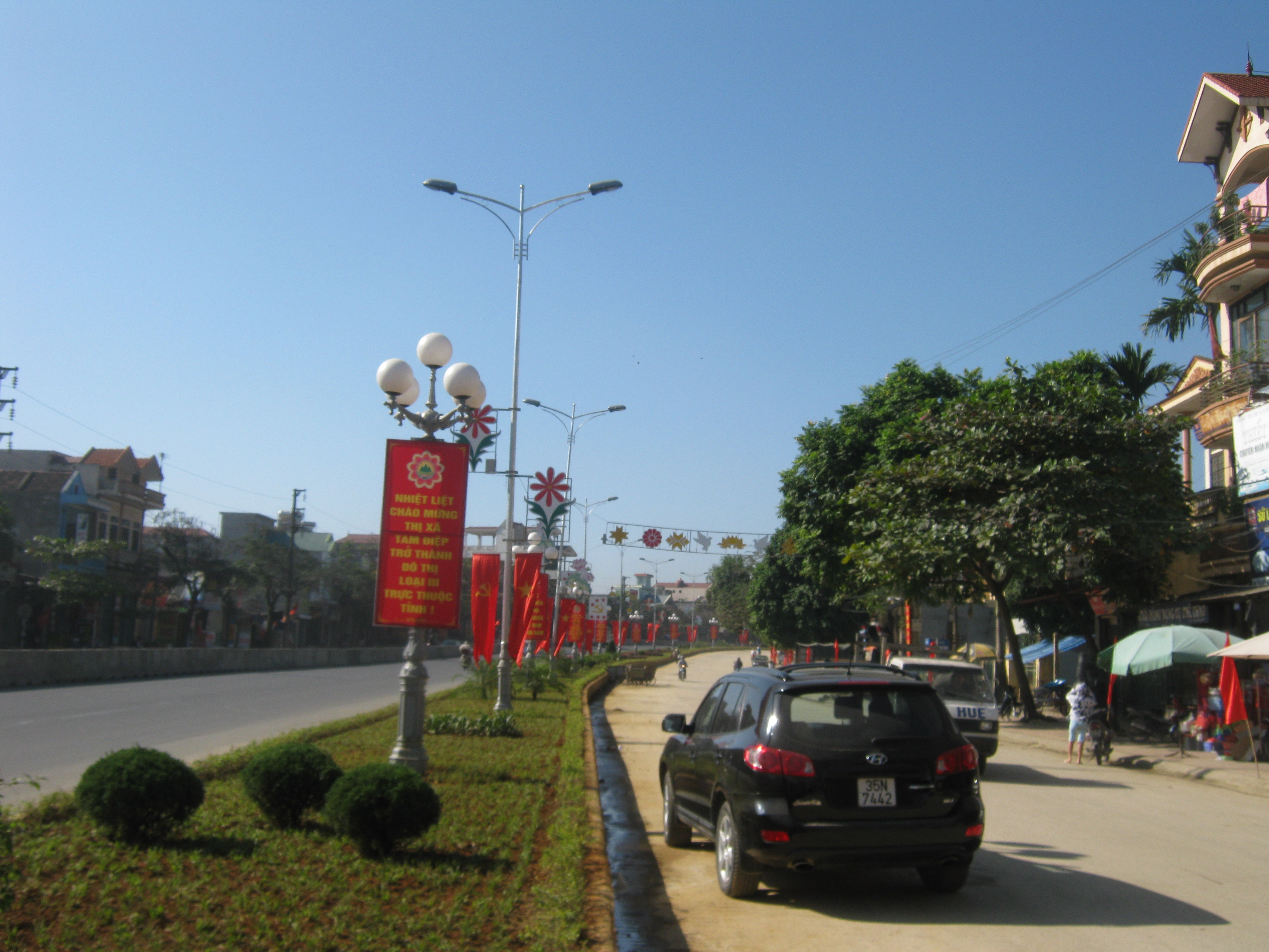 Phong cảnh đô thị Tam Điệp, Ninh Bình